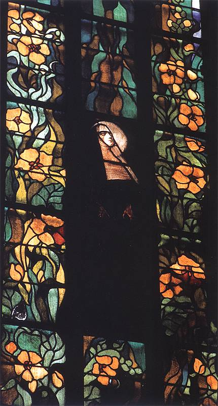 Stanisław Wyspiański